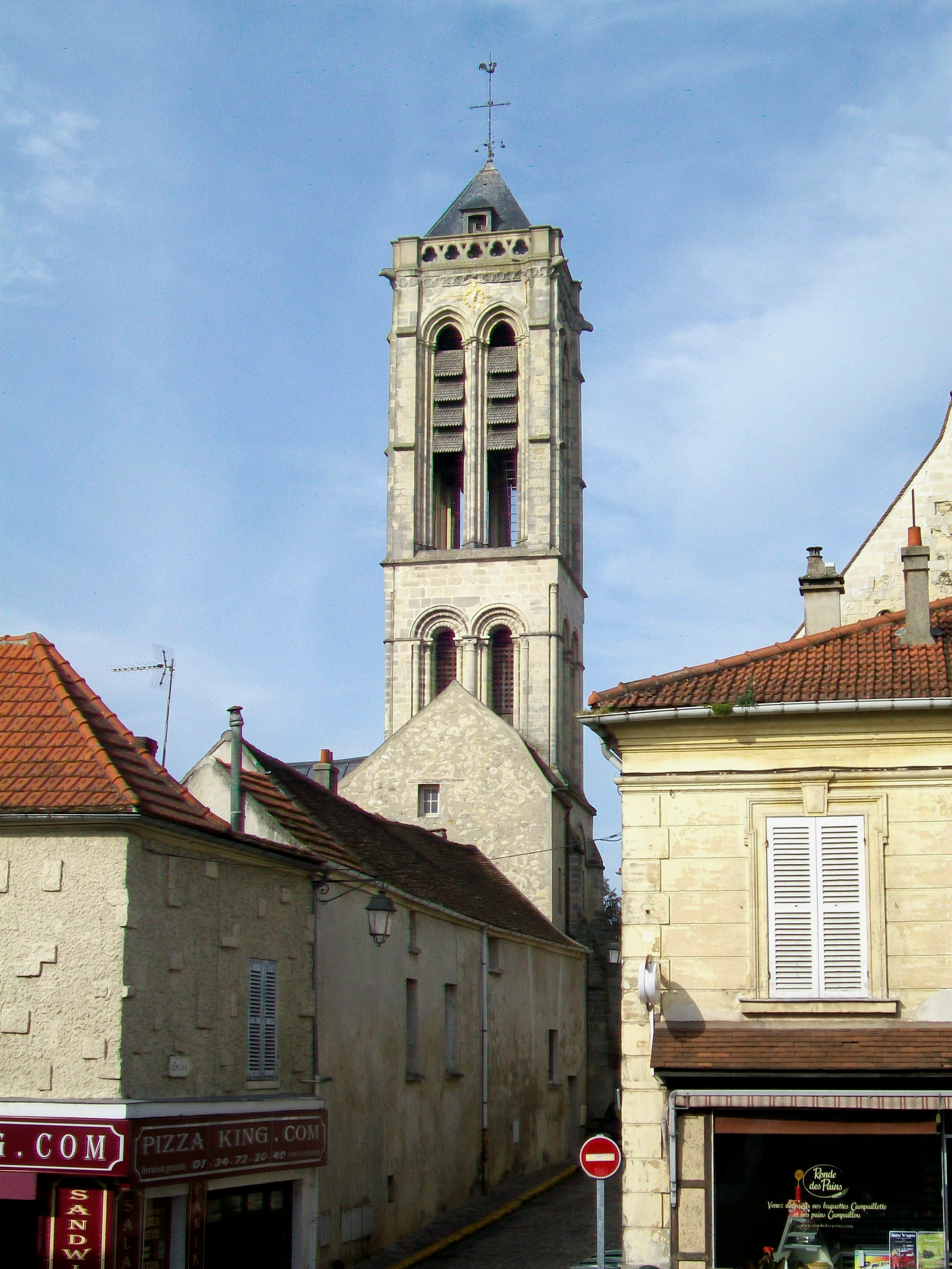 La tour Saint-Rieul depuis la rue de Paris.